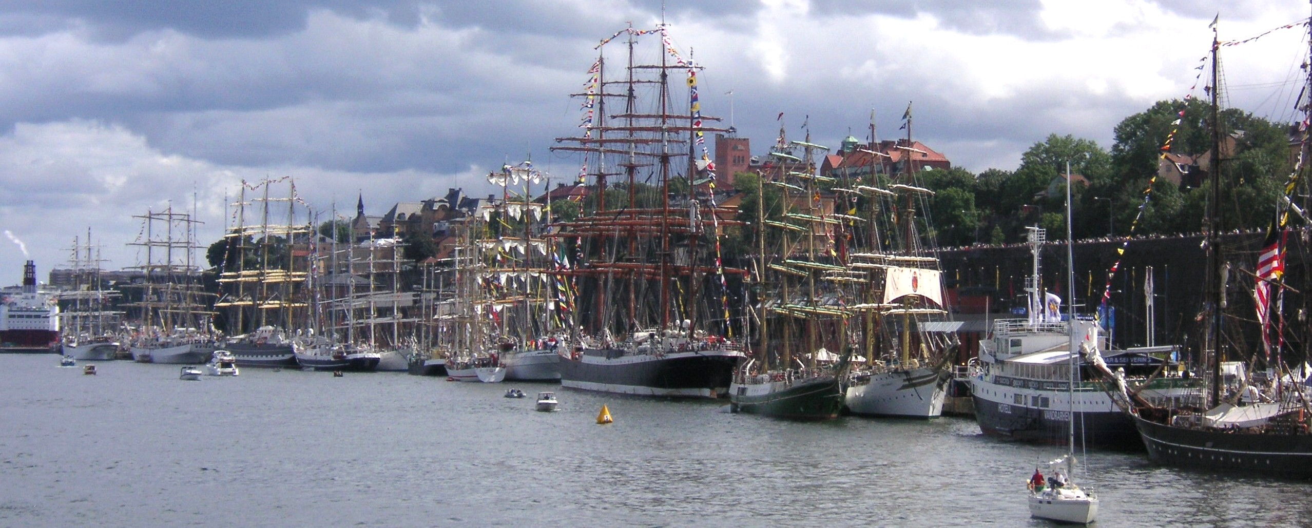 Stadsgården i Stockholm under "The Tall Ship's Races" år 2007